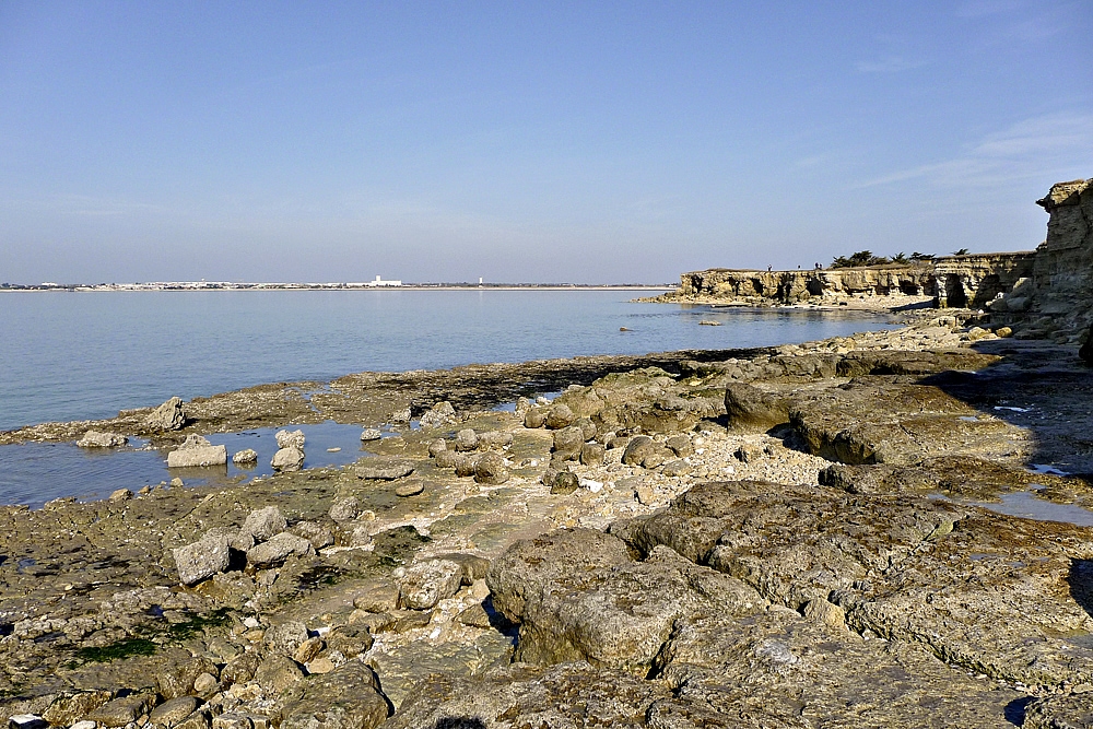 La pointe du Chay - Charente Maritime - France